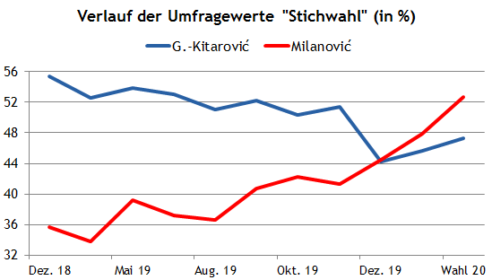 Präsidentschaftswahl Kroatien 19-20 Umfragen Stichwahl